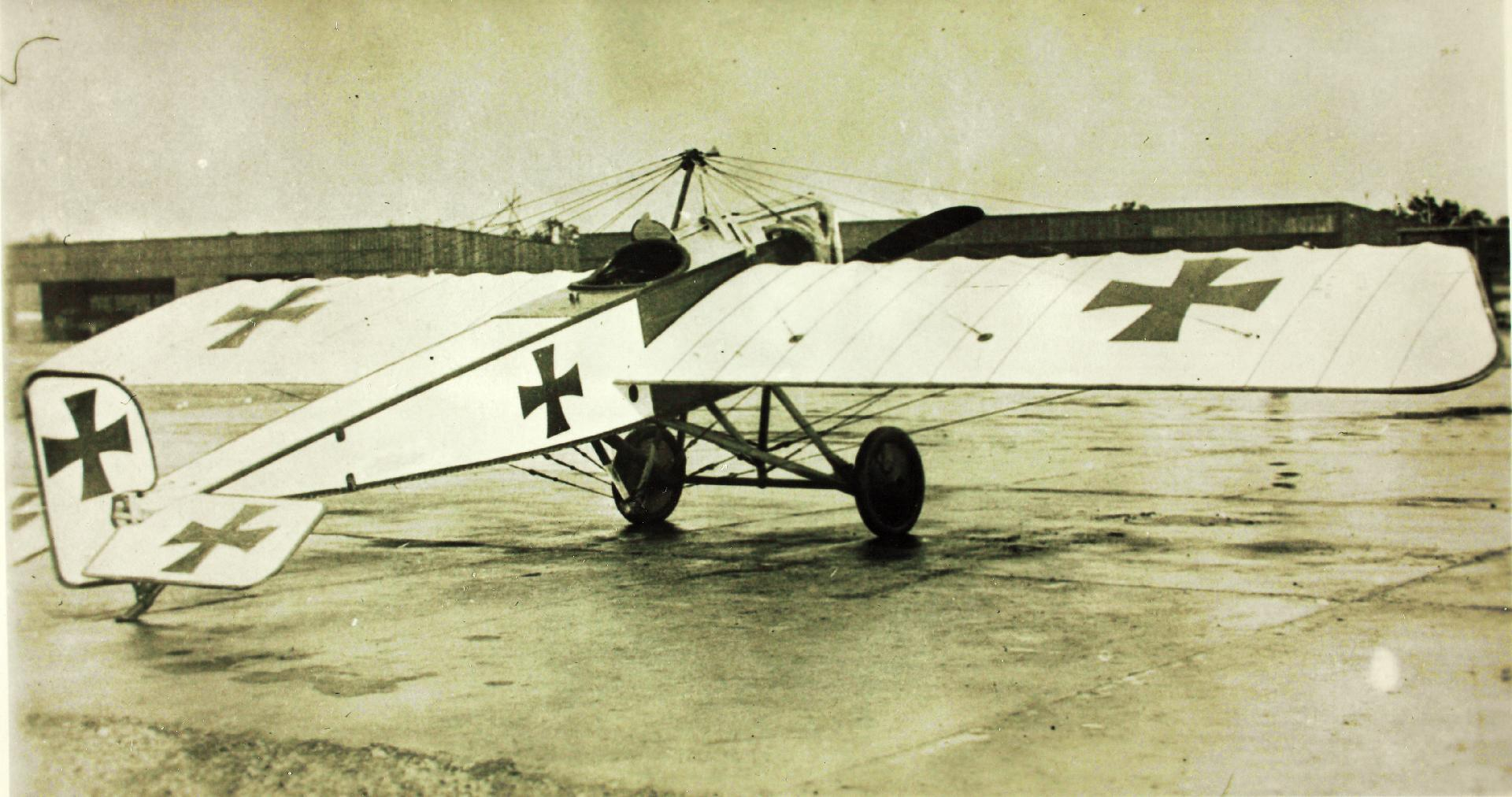 Pfalz E.V